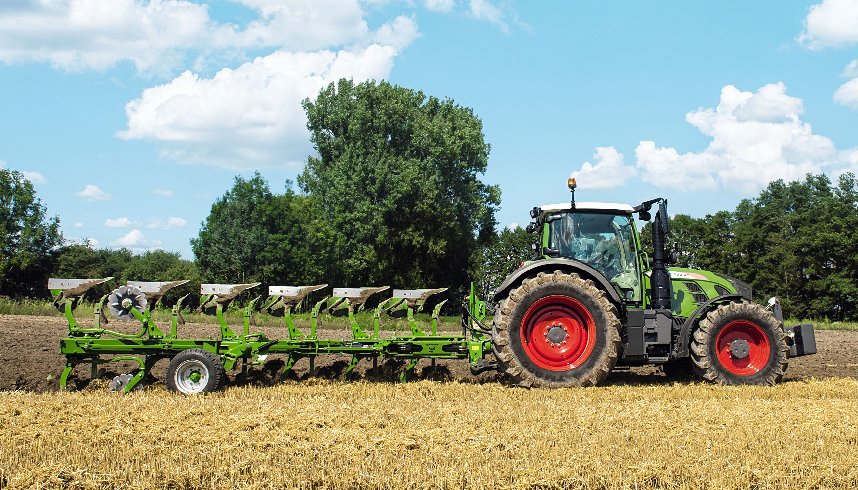 Fendt 724 Vario mit einem 6-Schar-Pflug von Amazone